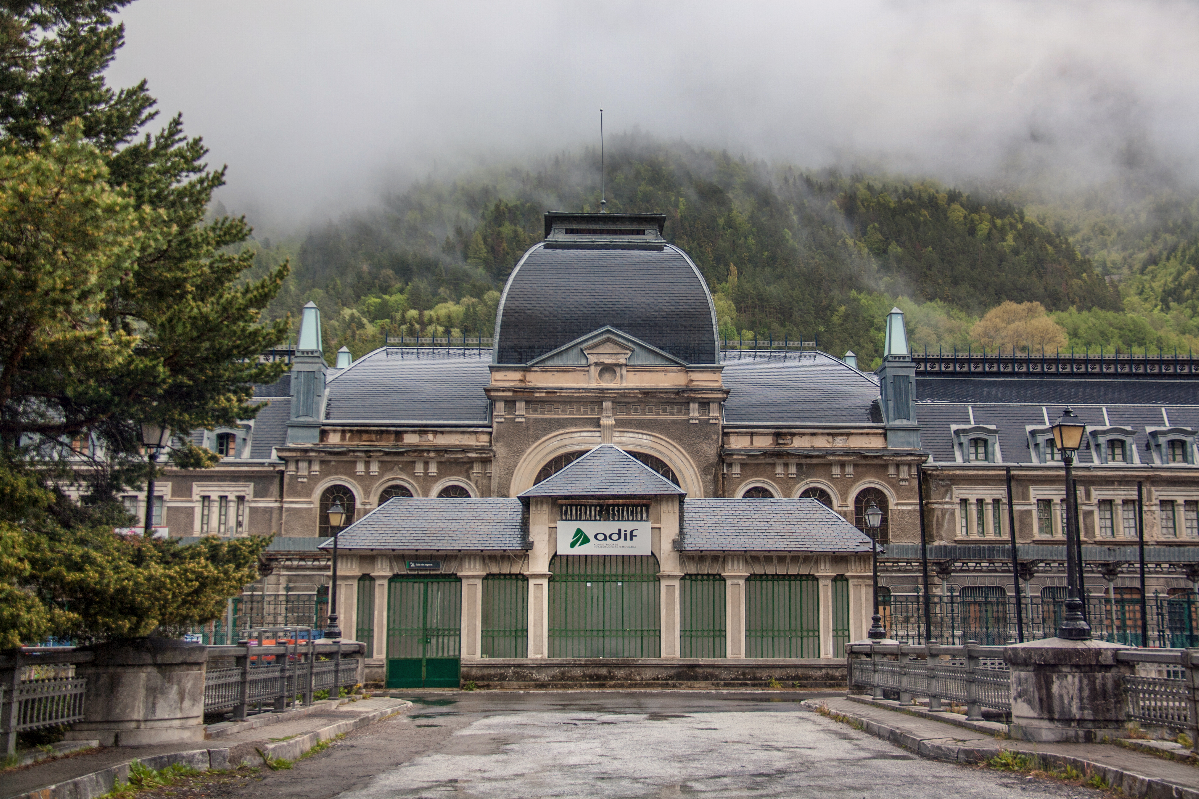 Canfranc, España